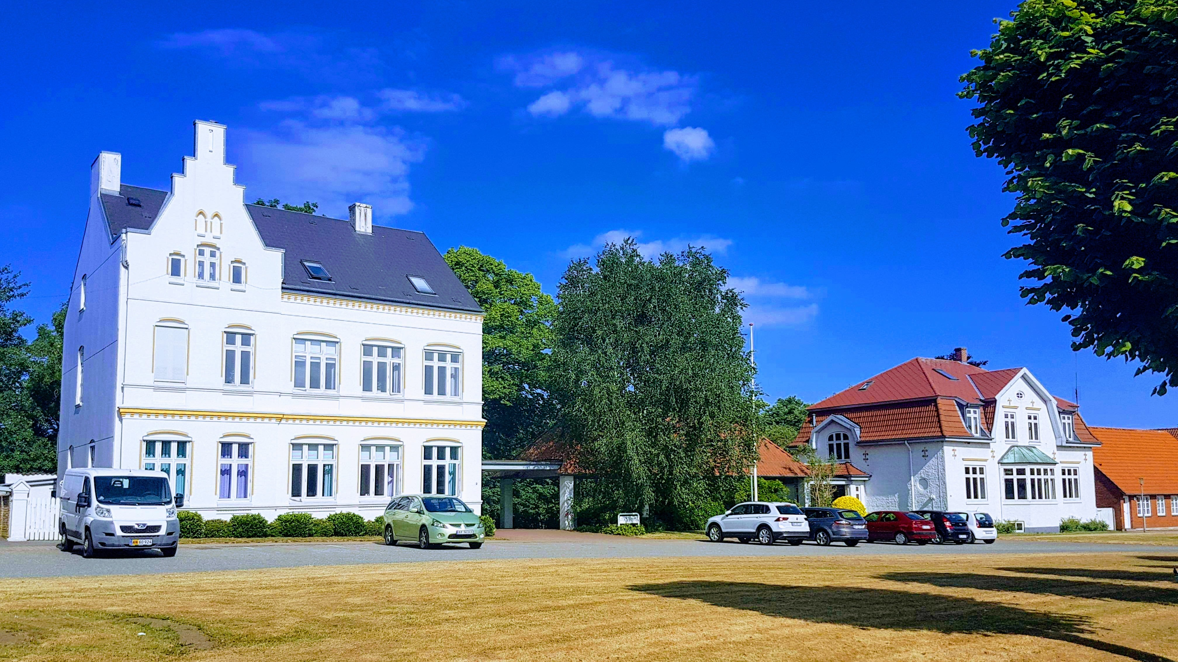 Scandinavian Carillon School in Løgumkloster